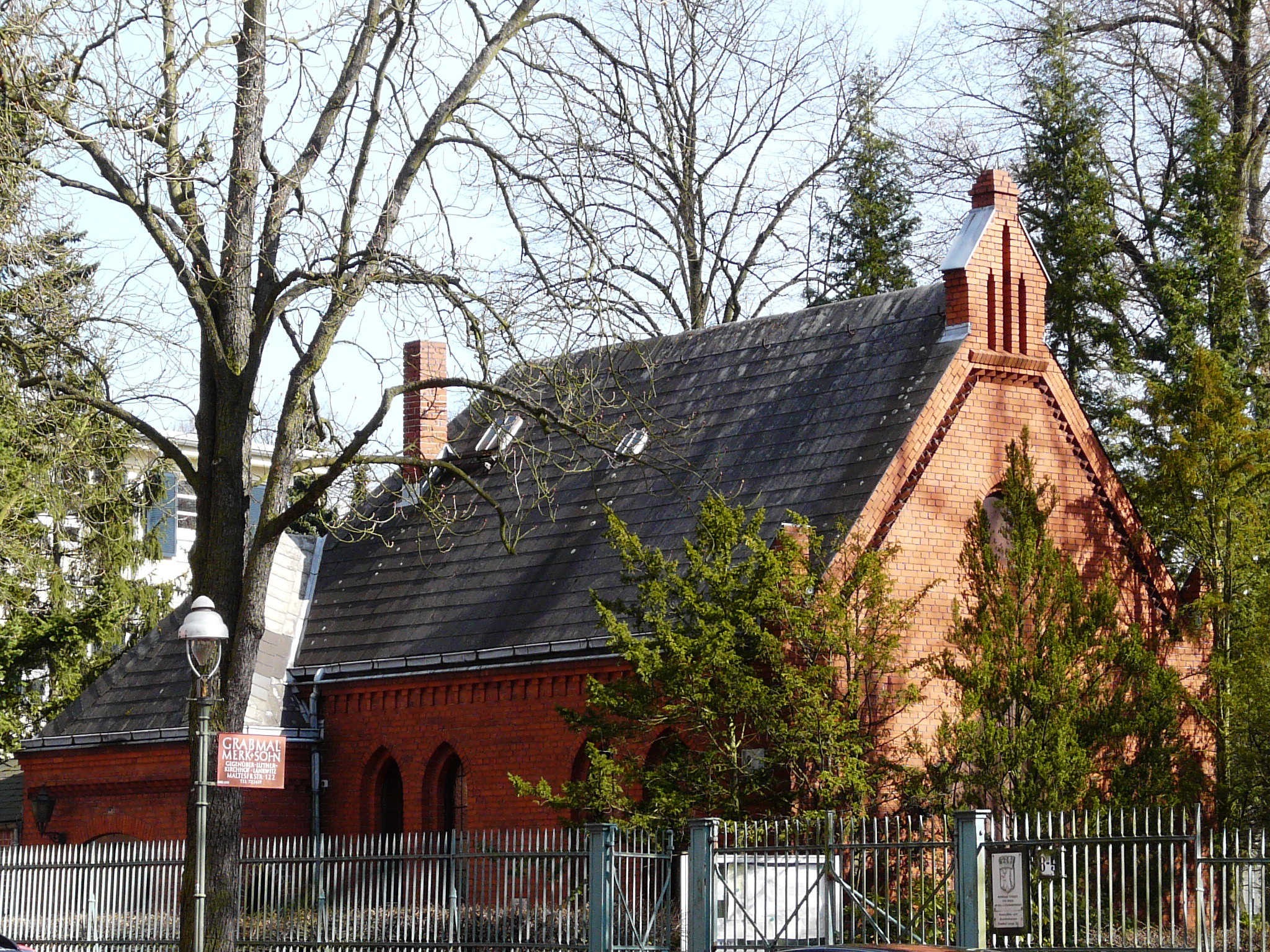 Friedhofskapelle - Friedhof Lankwitz in Berlin-Lankwitz